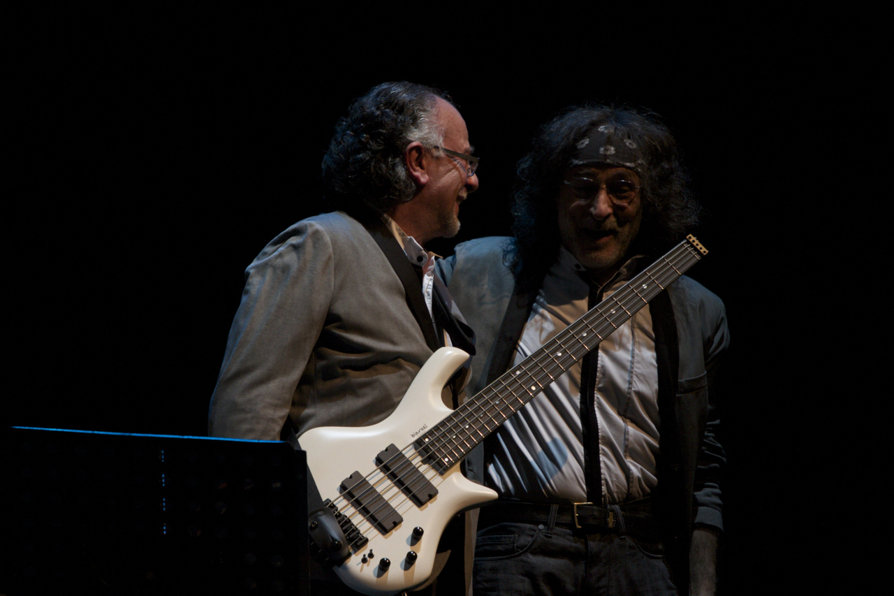 Patrick Djivas e Franz di Cioccio durante il tour PFM in Classics del 2011